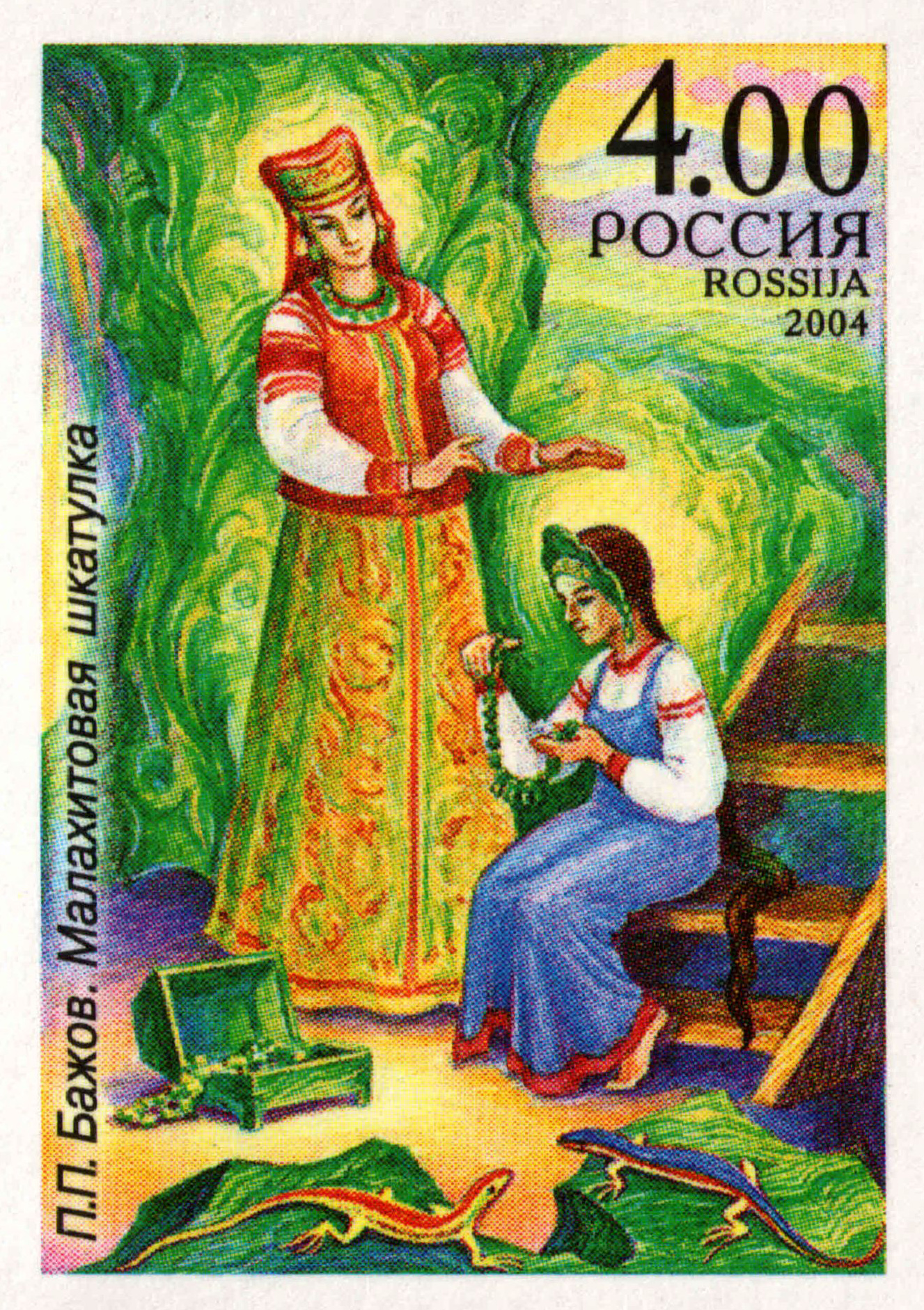 125 со дня рождения П. П. Бажова (1879–1850). Марка России, 27 января 2004 г. Иллюстрация к уральским сказам П. П. Бажова: № 913, 4,00 руб. «Малахитовая шкатулка»: Хозяйка Медной горы и Танюшка.